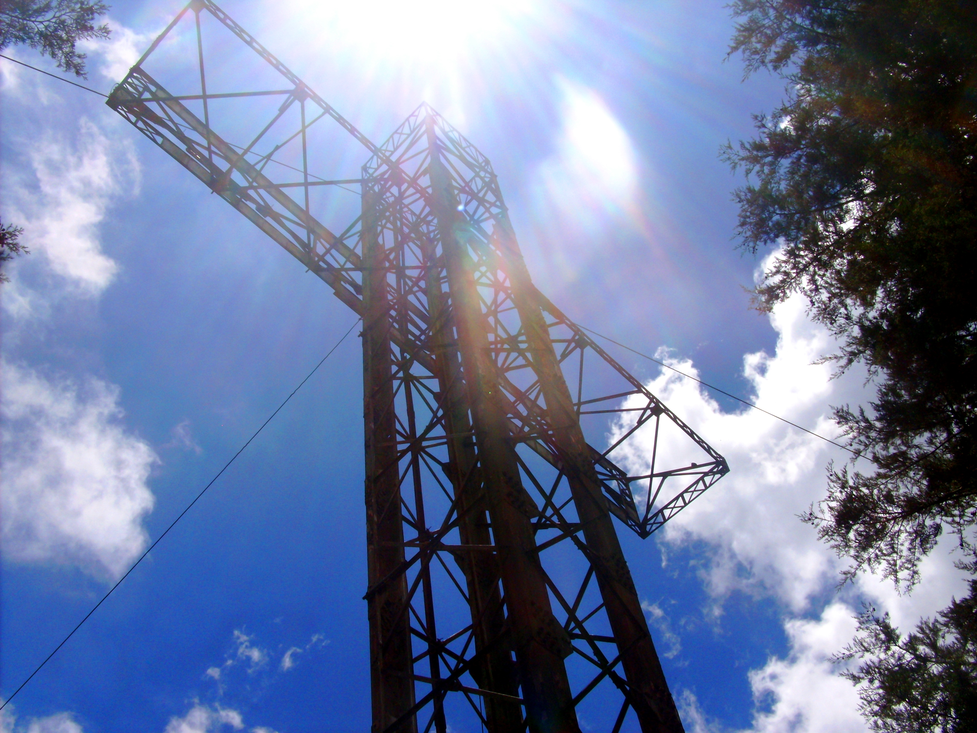 La Cruz de Alajuelita, San José, Costa Rica.